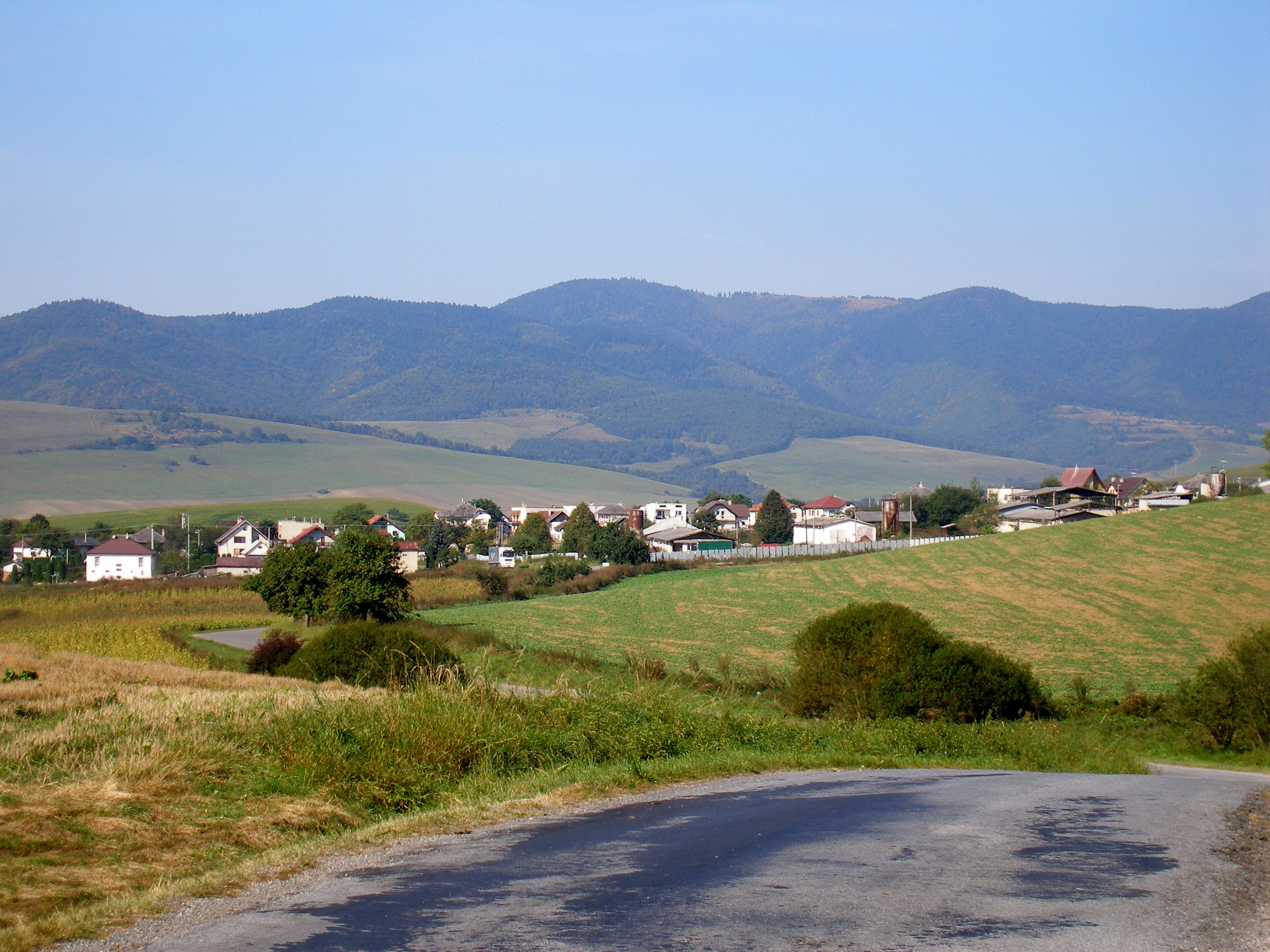 Śarišská obec Ovčie okres Prešov.